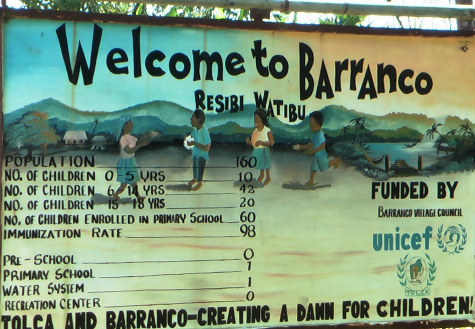 Barranco Ortsschild